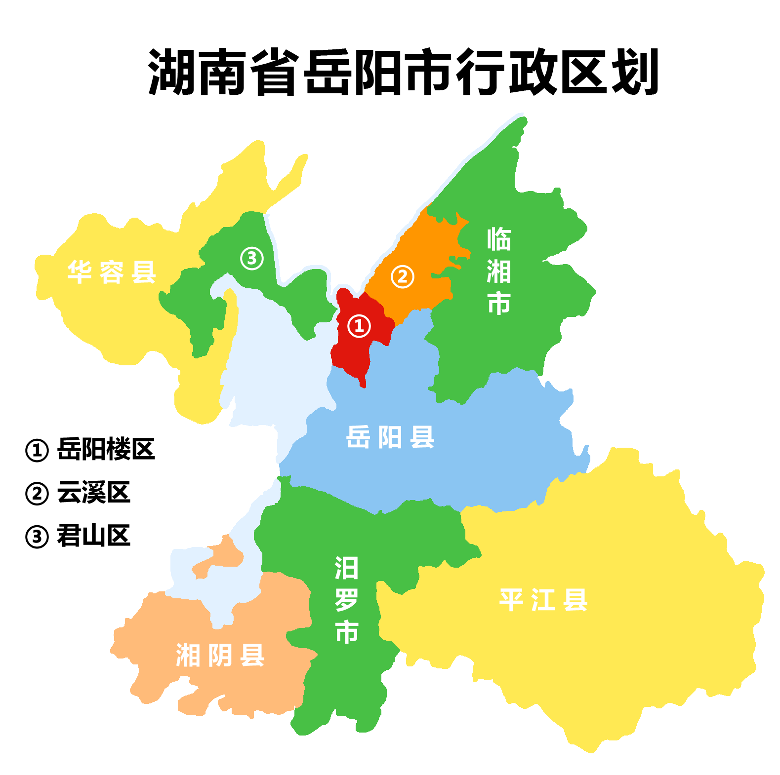 中文（中国大陆）: 岳阳市行政区划